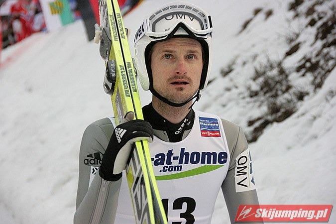 Jakub Janda podczas konkursu indywidualnego mężczyzn na skoczni normalnej w ramach Mistrzostw Świata 2013.